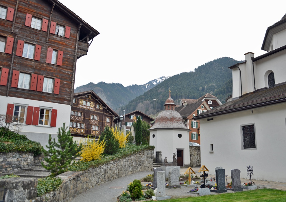 Bürglen, Uri